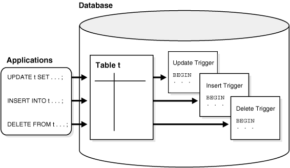 Монгол: Триггер